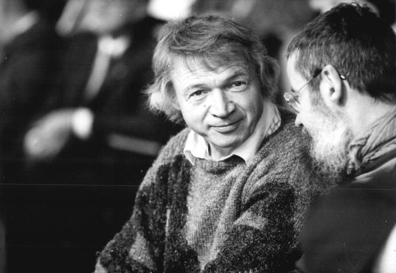 ADN-ZB Senft 16.12.89 Berlin: SED-Parteitag Der außerordentliche Parteitag der SED hat in der Dynamohalle seine am vergangenen Wochenende unterbrochene Beratung fortgesetzt. Im Auditorium als Gast auch der wieder eingebürgerte Philosoph Rudolf Bahro.